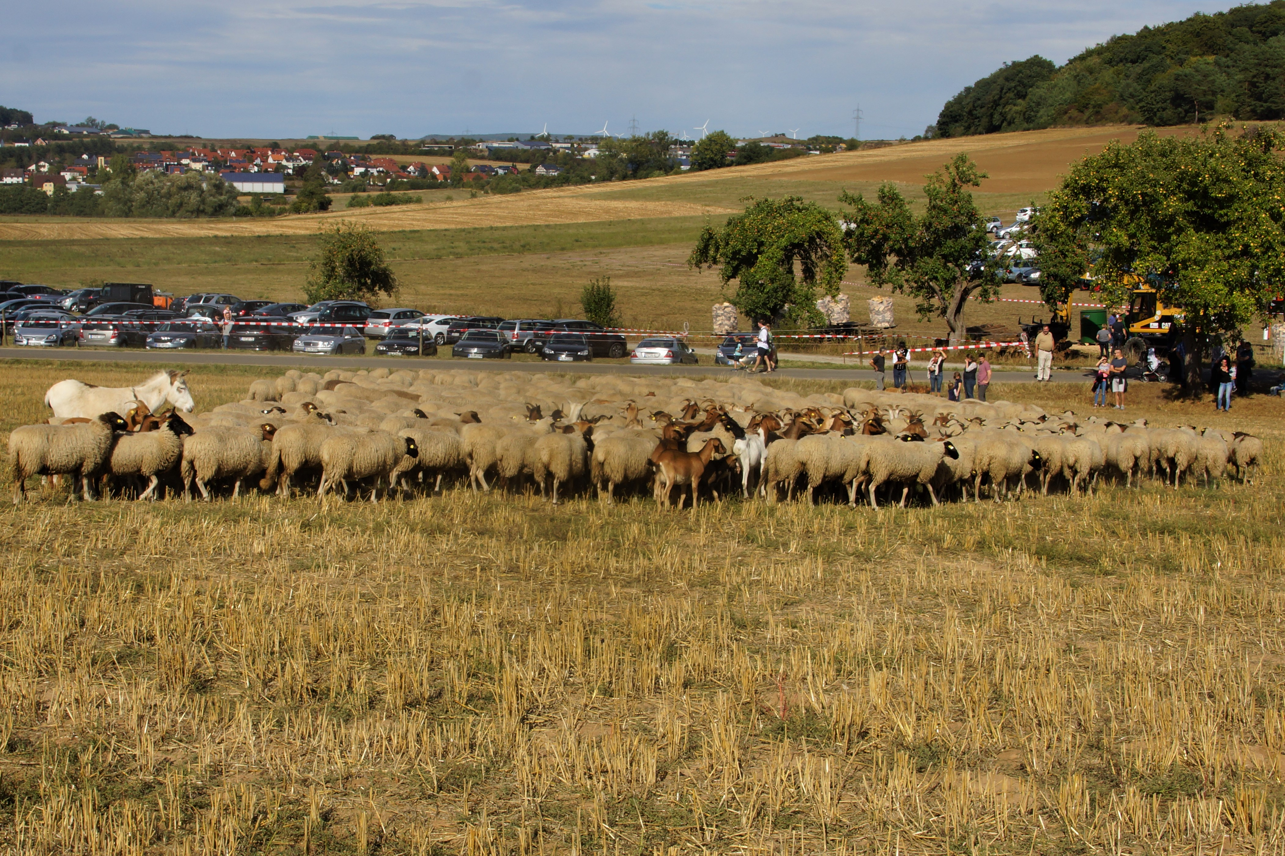 Gemischte Herde - Rhönschaf, Coburger Fuchs, Kamerunschaf, Ziegen und ein Esel mit Schäfer